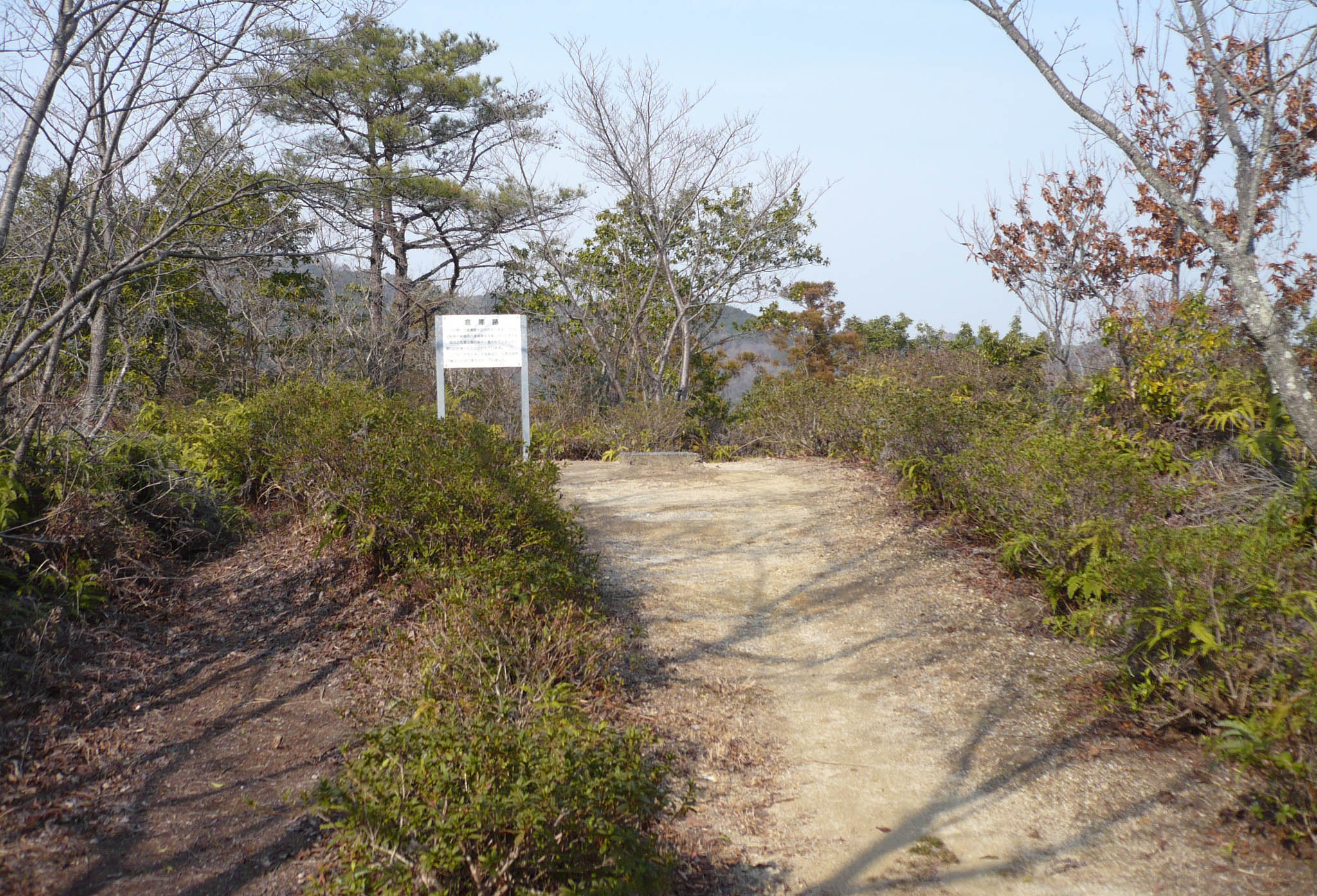 倉庫曲輪跡